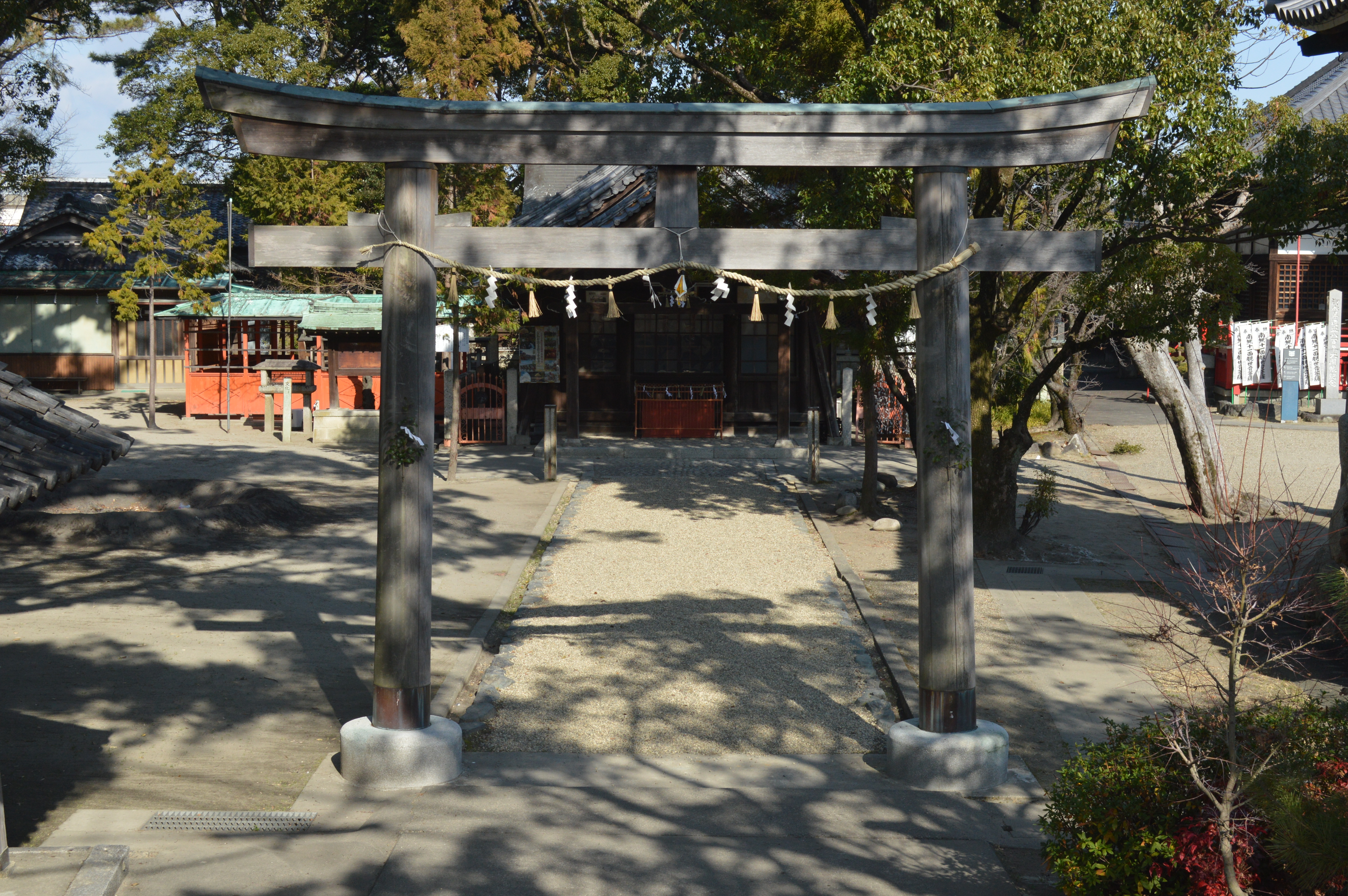 愛知県海部郡蟹江町にある冨吉建速神社・八剱社（両社を合わせて須成神社とも）。